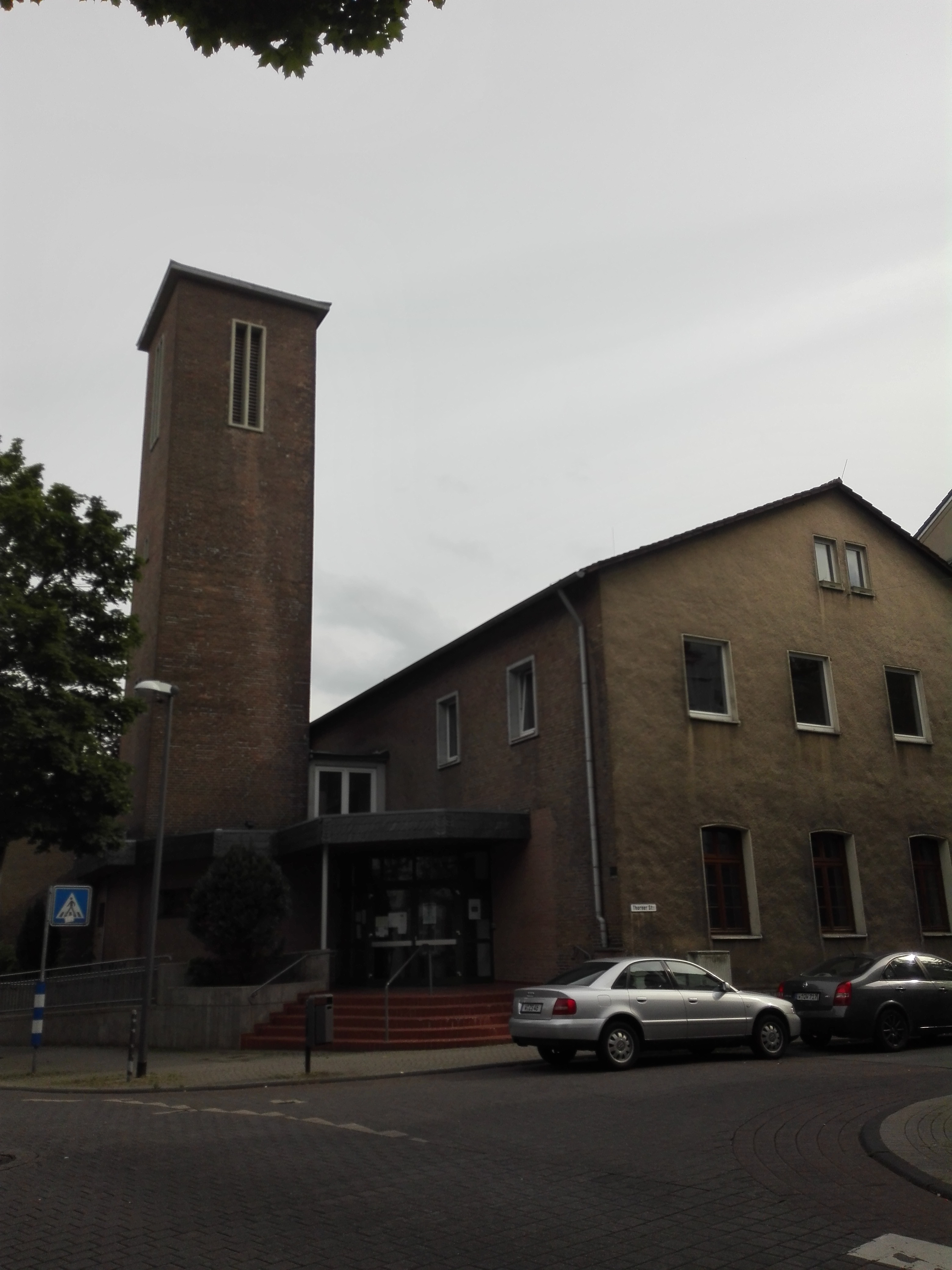 Ansichten der Rotter Kirche in Wuppertal-Unterbarmen